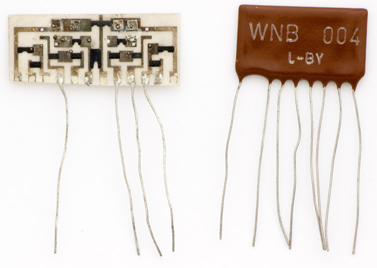 Destička se součástkami a podobný již zapouzdřený hybridní integrovaný obvod Tesla WNB 004 - Schmittův klopný obvod pro ovládání relé.